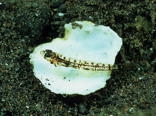 Grallenia lipi Described in 2007. Indonesia, Bali, Zen Beach